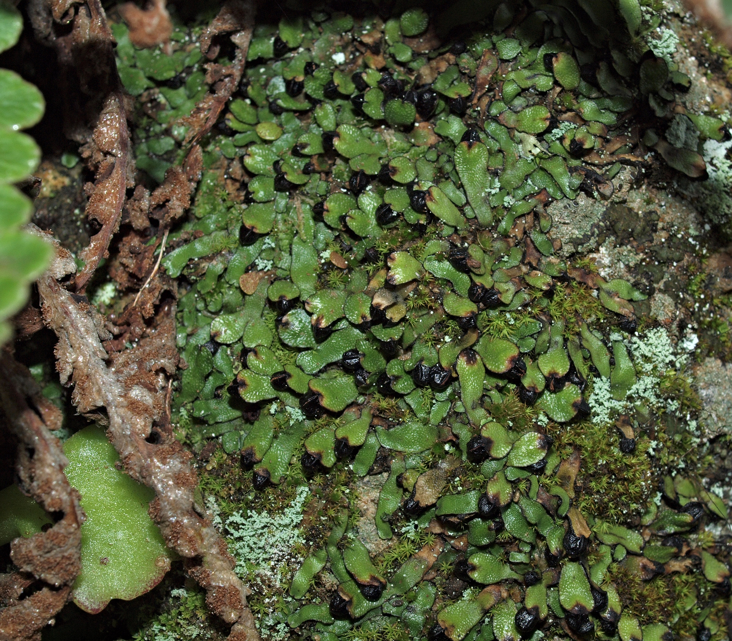 Targionia hypophylla, con involucros. Pared rezumante de bancal. Losar de la Vera (Cáceres, España).